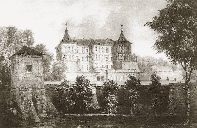 Zamek Koniecpolskich w Podchorcach koło Lwowa.